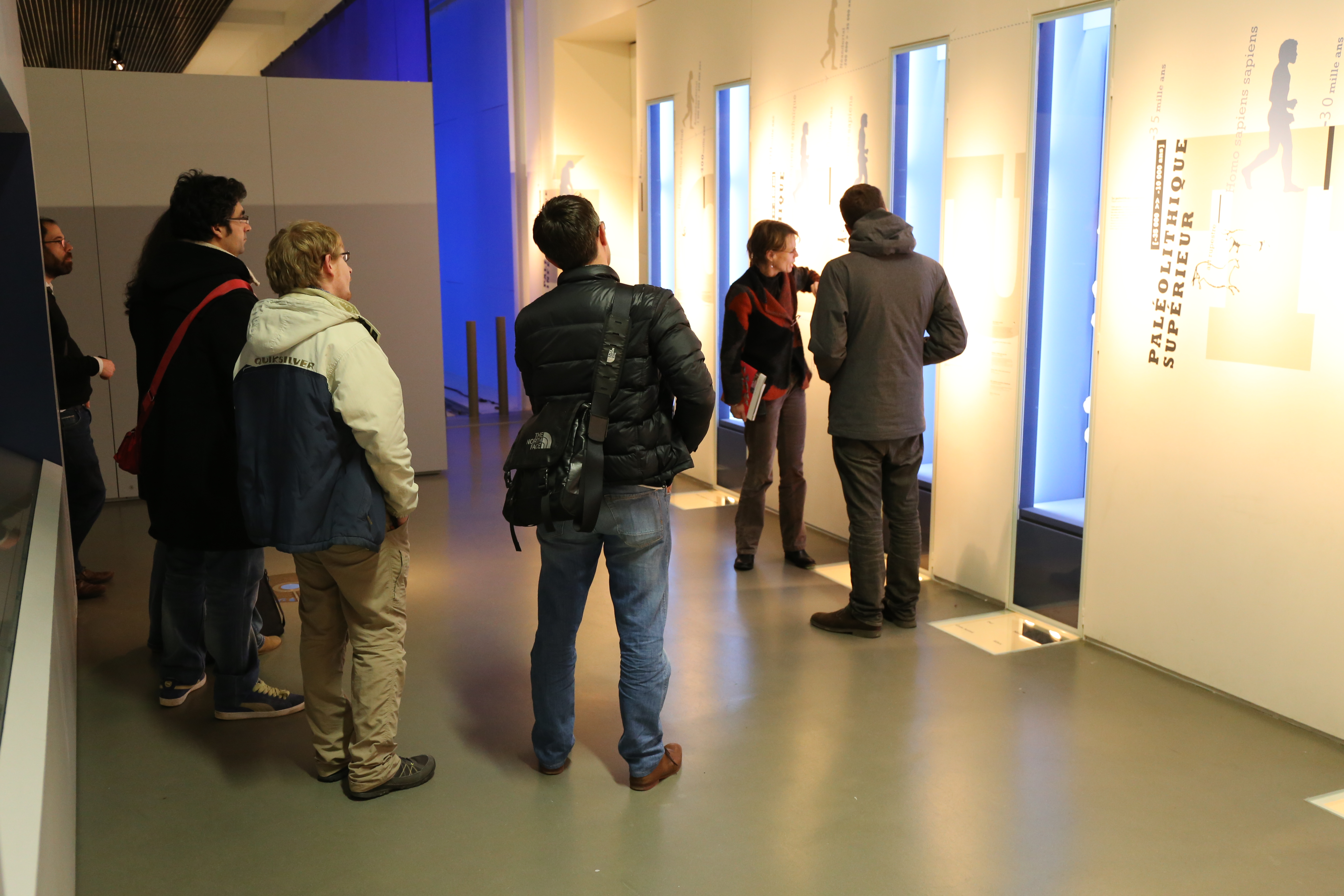 Visite du musée de Bretagne lors de la Wikipermanence du 20 janvier 2015 sur la préhistoire.